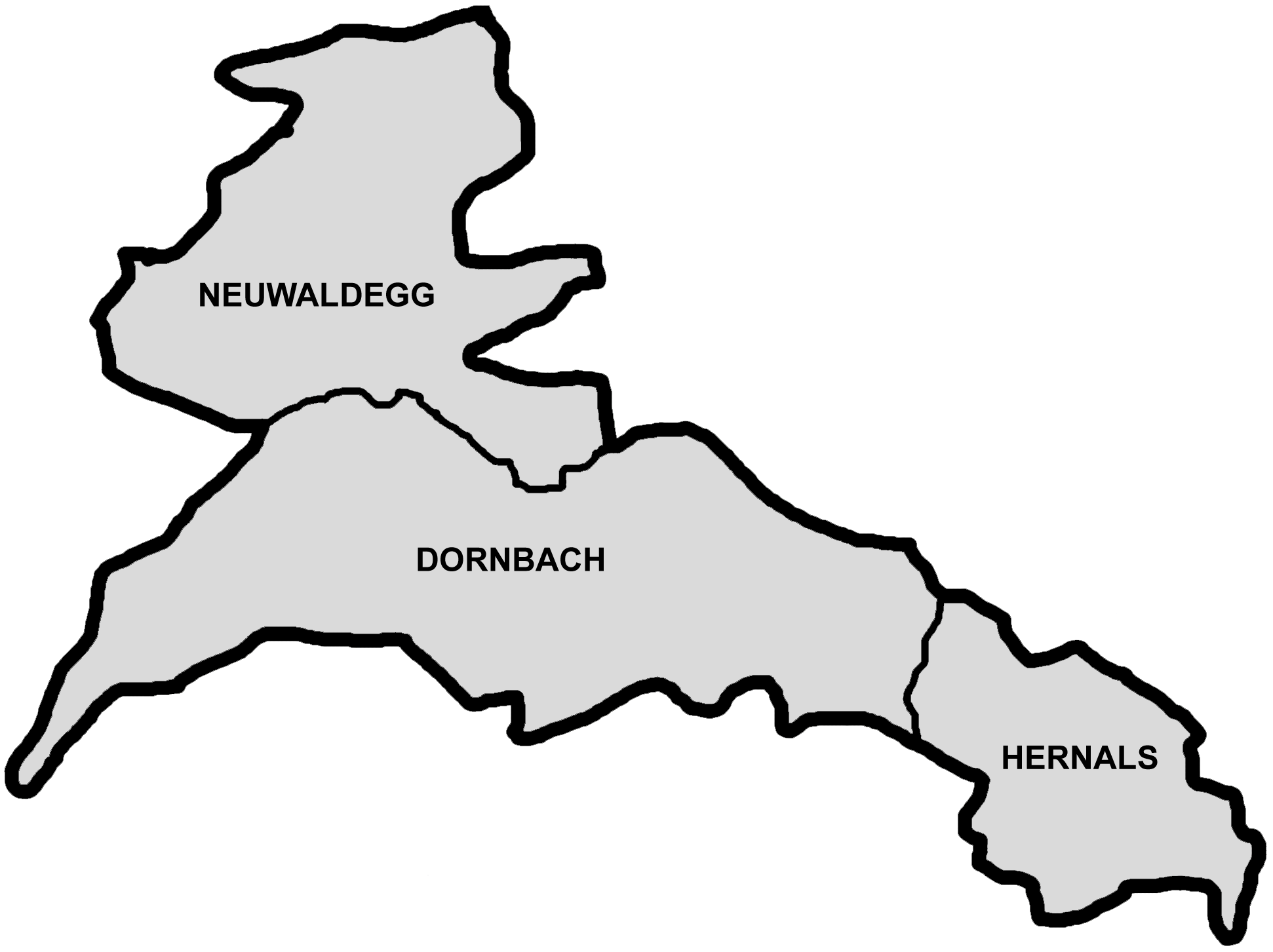 Karte der Bezirksteile von Hernals in Wien